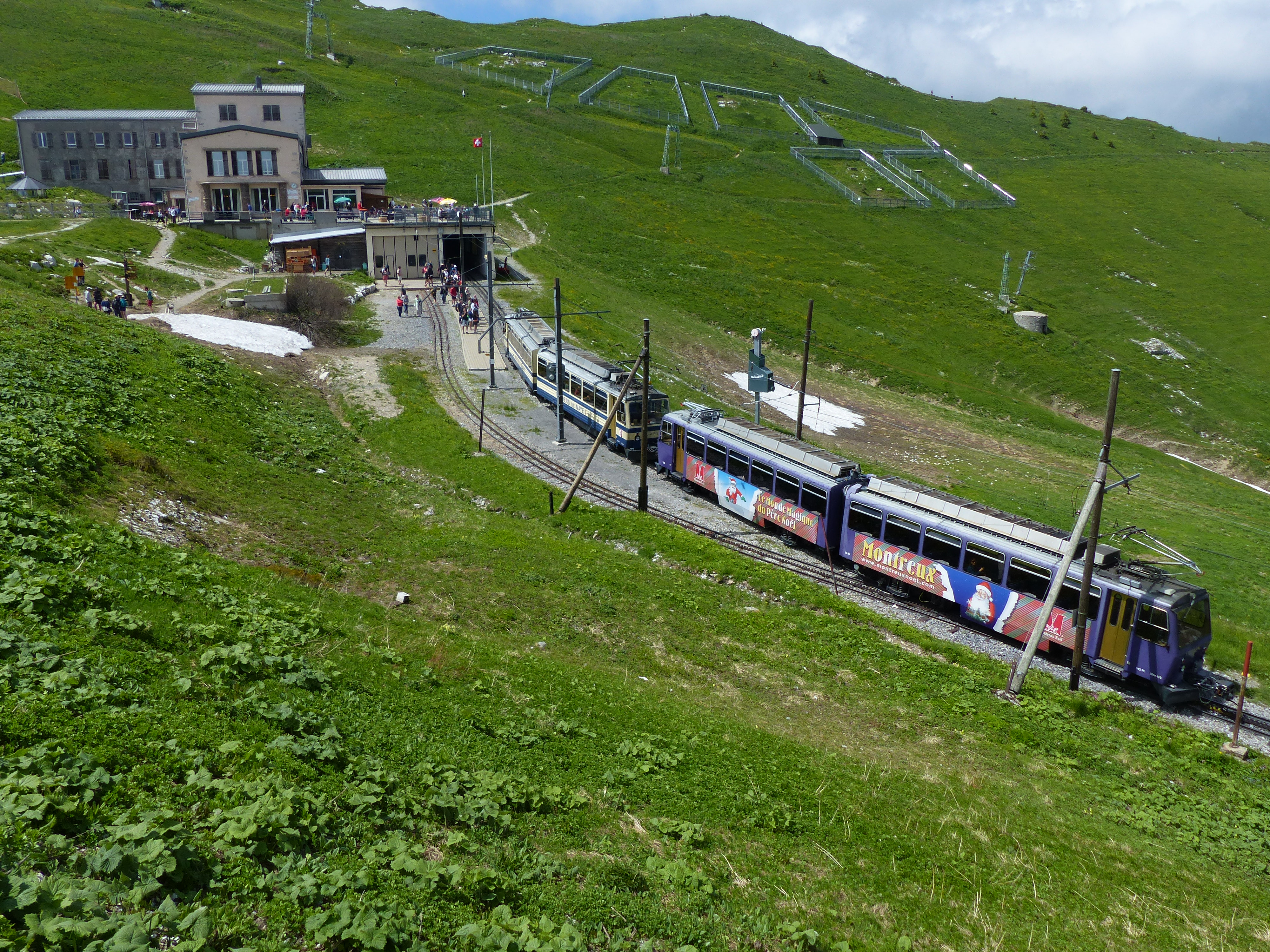 Zug führt in die Bergstation Rochers de Naye ein